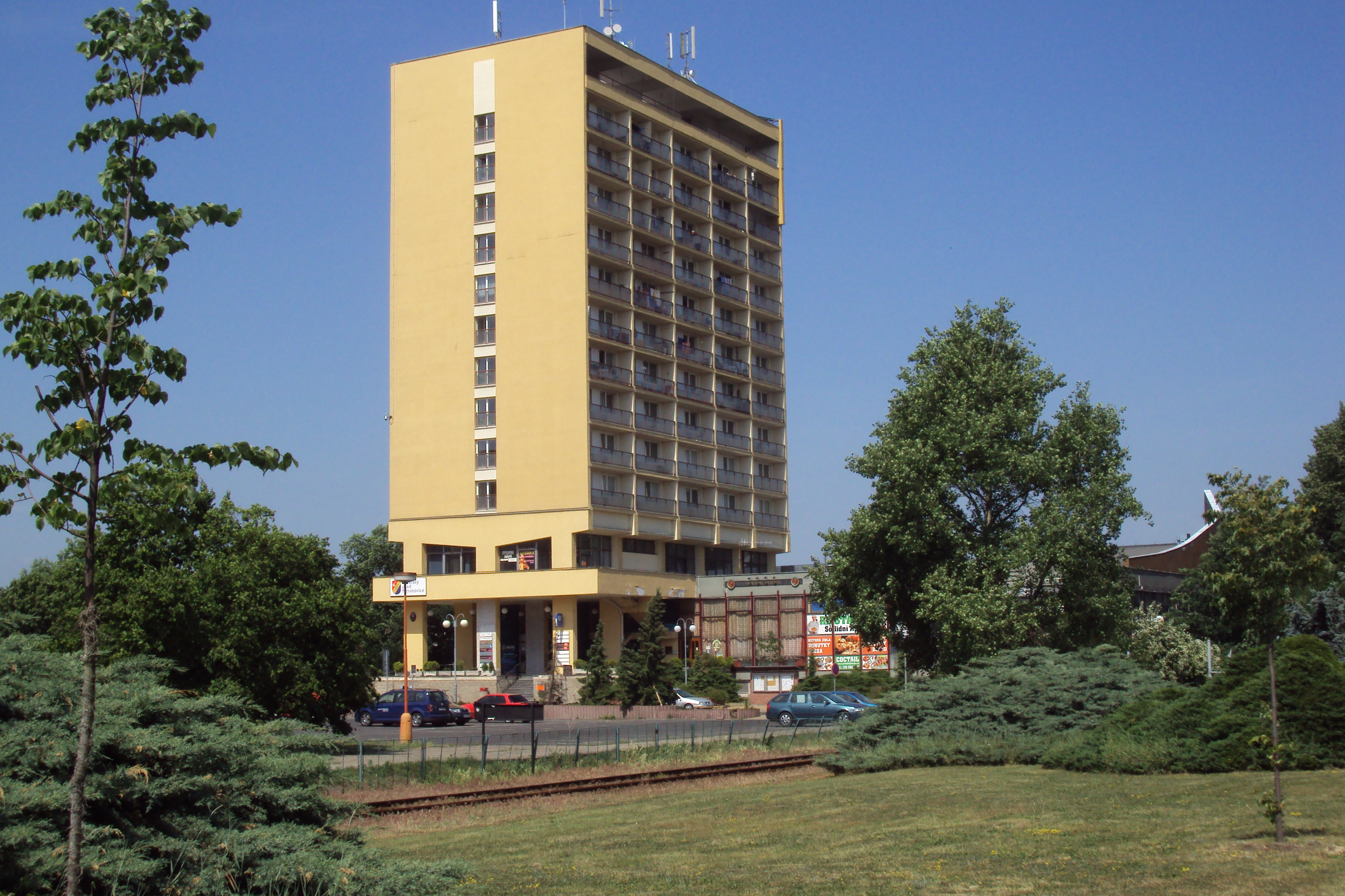 Kulturní dům Neratovice, nám. Republiky